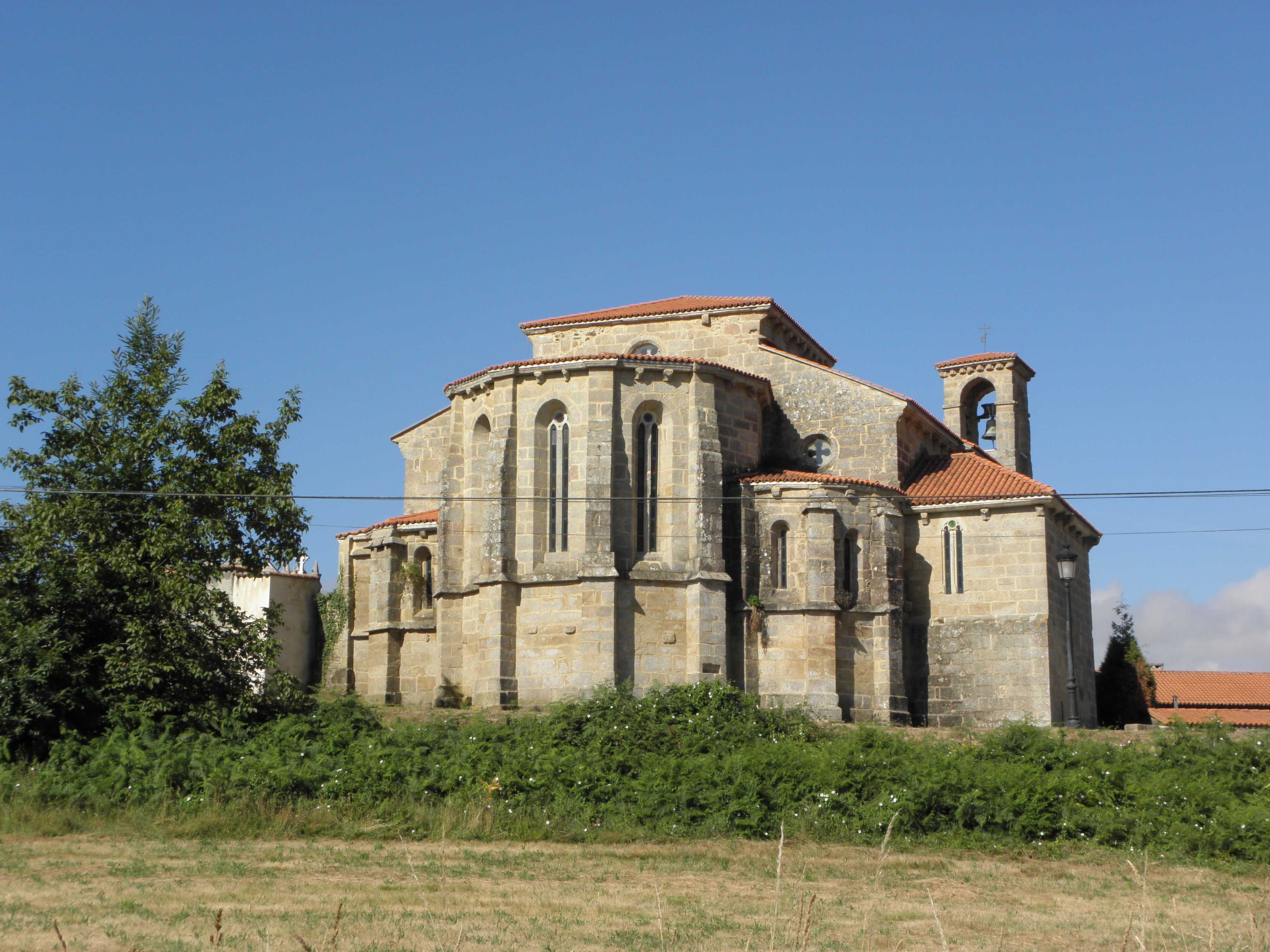 "Era un mosteiro de carácter patrimonial, é dicir, sometido mediante un "pactum" co seu abade, á poderosa familia que o fundou. Desde os seus inicios ata 1108 foi ademais dúplice, isto é, con monxes e monxas compartindo o mesmo edificio. O malestar por esta duplicidade supuxo un soado preito a principios do século XII, cando o mosteiro pertencía ao conde don Pedro Foliás. Todo empezou cando en 1108 o abade benedictino, don Nuño, seguindo o disposto polo papa Pascual II, expulsou do mosteiro ás monxas. Ao conde don Pedro molestoulle tal decisión e inmediatamente expulsou ao abade. Pero o papa Pascual II ordenou ao bispo de Compostela, Diego II, que o abade fose restituído e que as monxas instalásense efectivamente noutro lugar, quedando o abade de Cines na obrigación de prover o necesario para a súa alimentación e vestido. Don Pedro acudiu a Roma a ver ao papa coa documentación que demostraba que el era o lexítimo dono do mosteiro, e así, en 1110 reclamou ao bispo de Toledo, don Bernardo, e ao de Compostela, don Diego, que volvesen as monxas, e, se non fose posible, que levasen a máis monxes..."para que non se perda a vida monástica". As monxas nunca regresaron e a vida monástica perdeuse: tras os séculos de esplendor, a desamortización de Mendizábal de 1836 supuxo a exclaustración dos monxes e que as propiedades do mosteiro pasasen ao Estado, o que levou ao convento a un estado ruinoso".